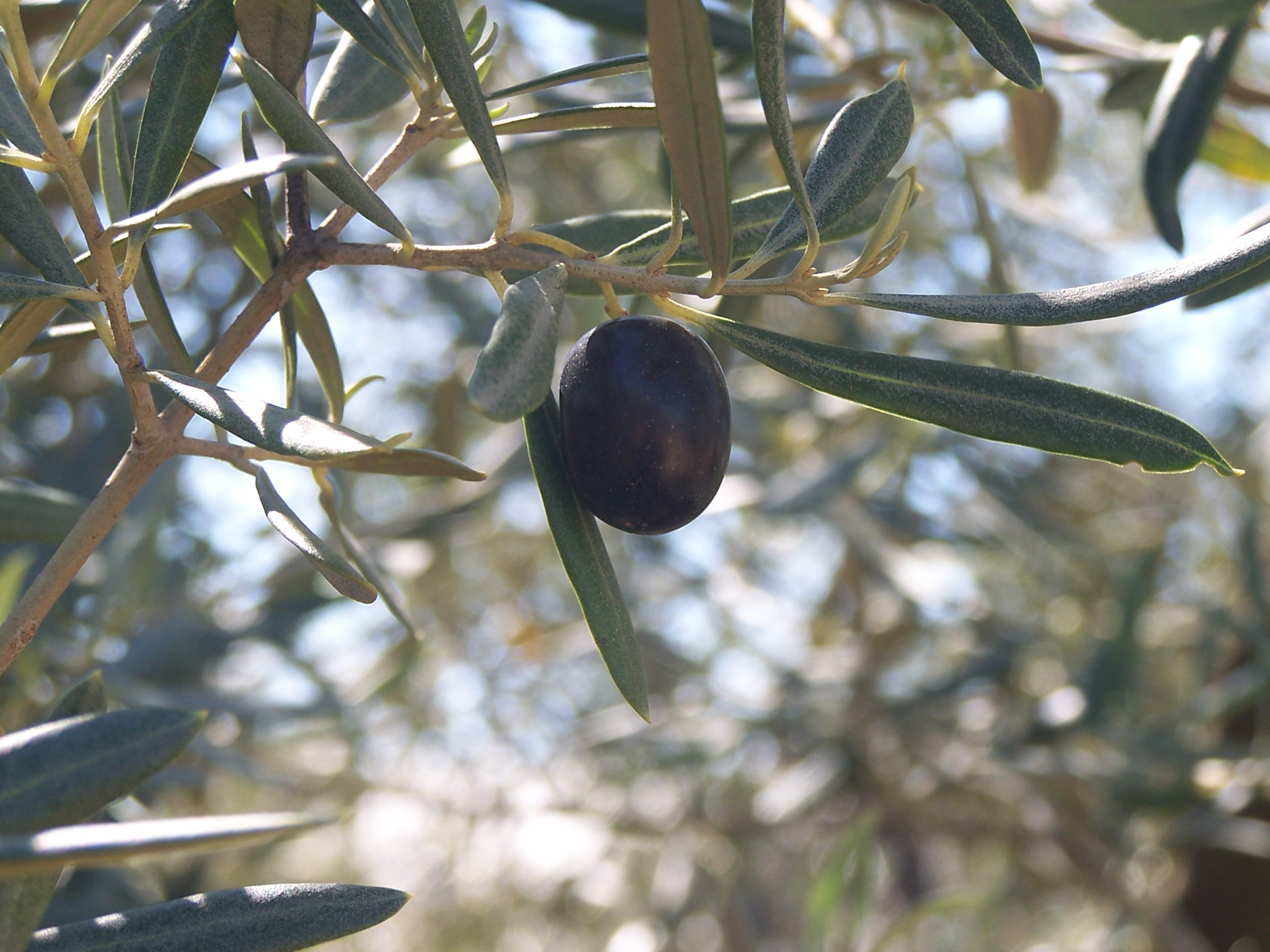 Aceituna, variedad hojiblanca